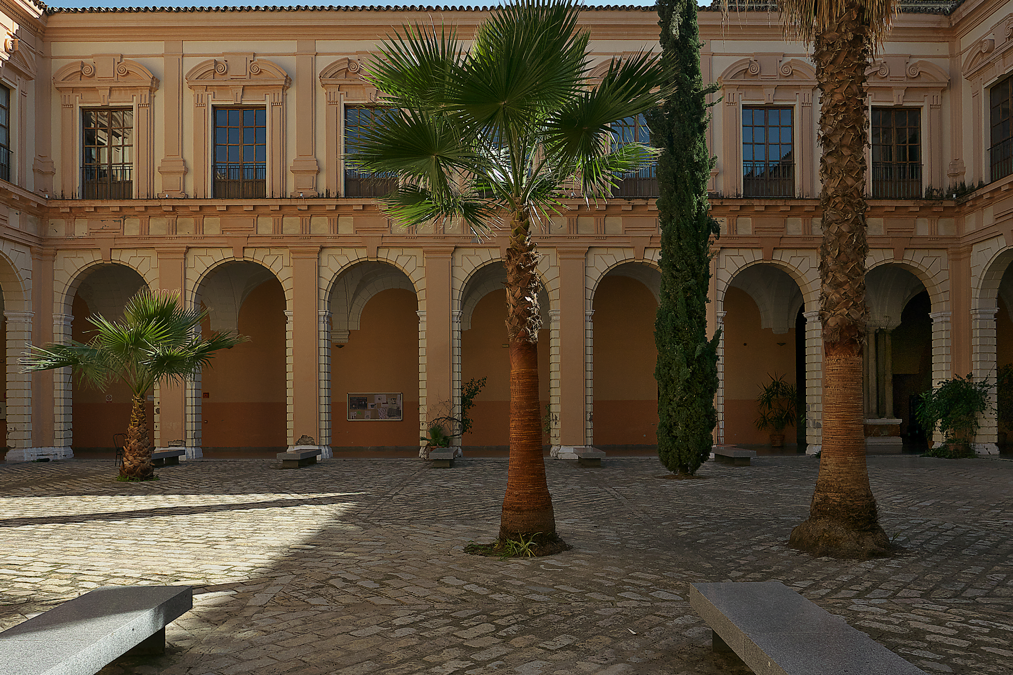 Patio principal del antiguo convento de carmelitas calzados en Sevilla. Atribuido a Vermondo Resta (h 1585)